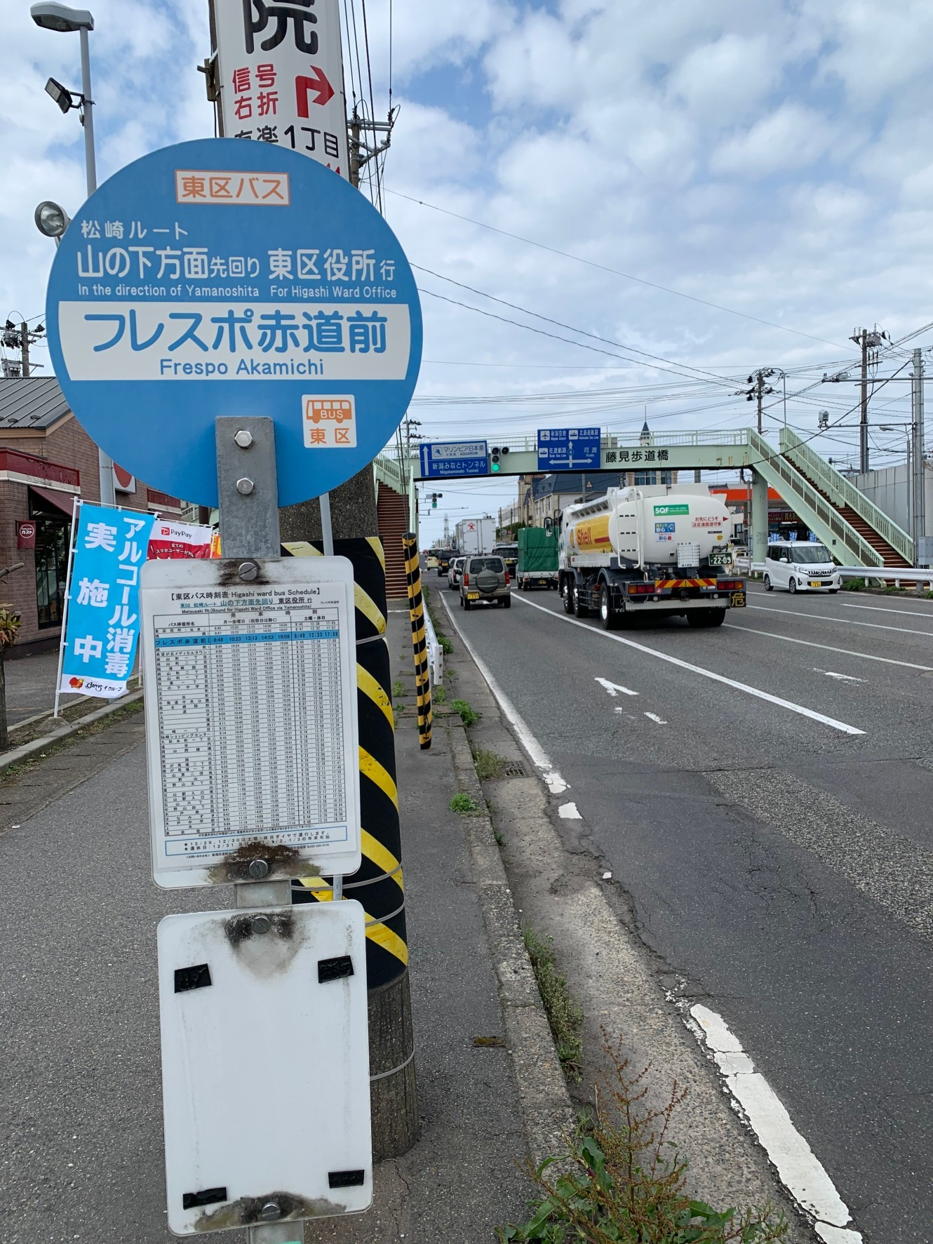 新潟市東区区バス「フレスポ赤道前」バス停（2020年4月）